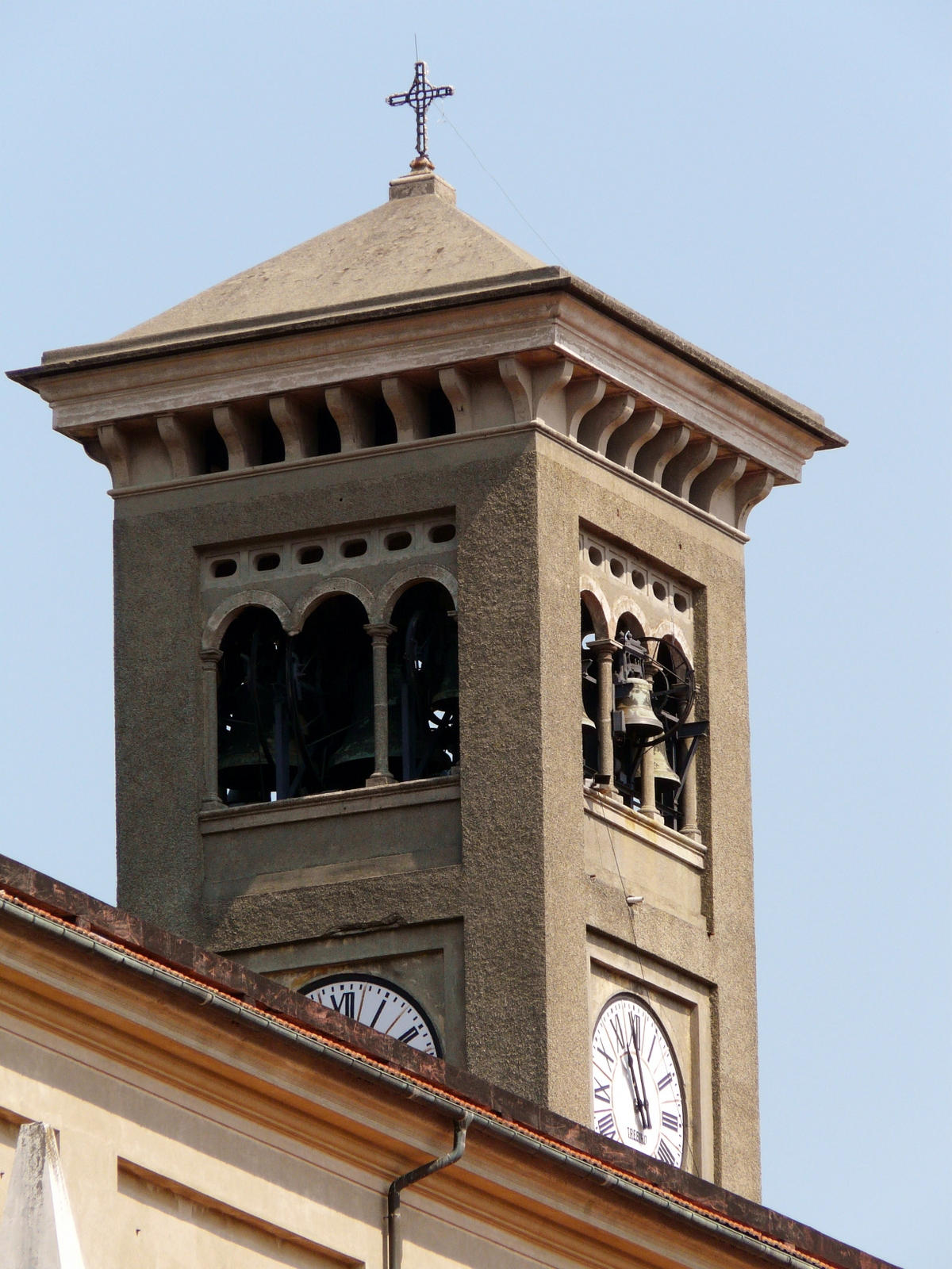 Campanile della chiesa di Cristo Re, Masone, Liguria, Italia